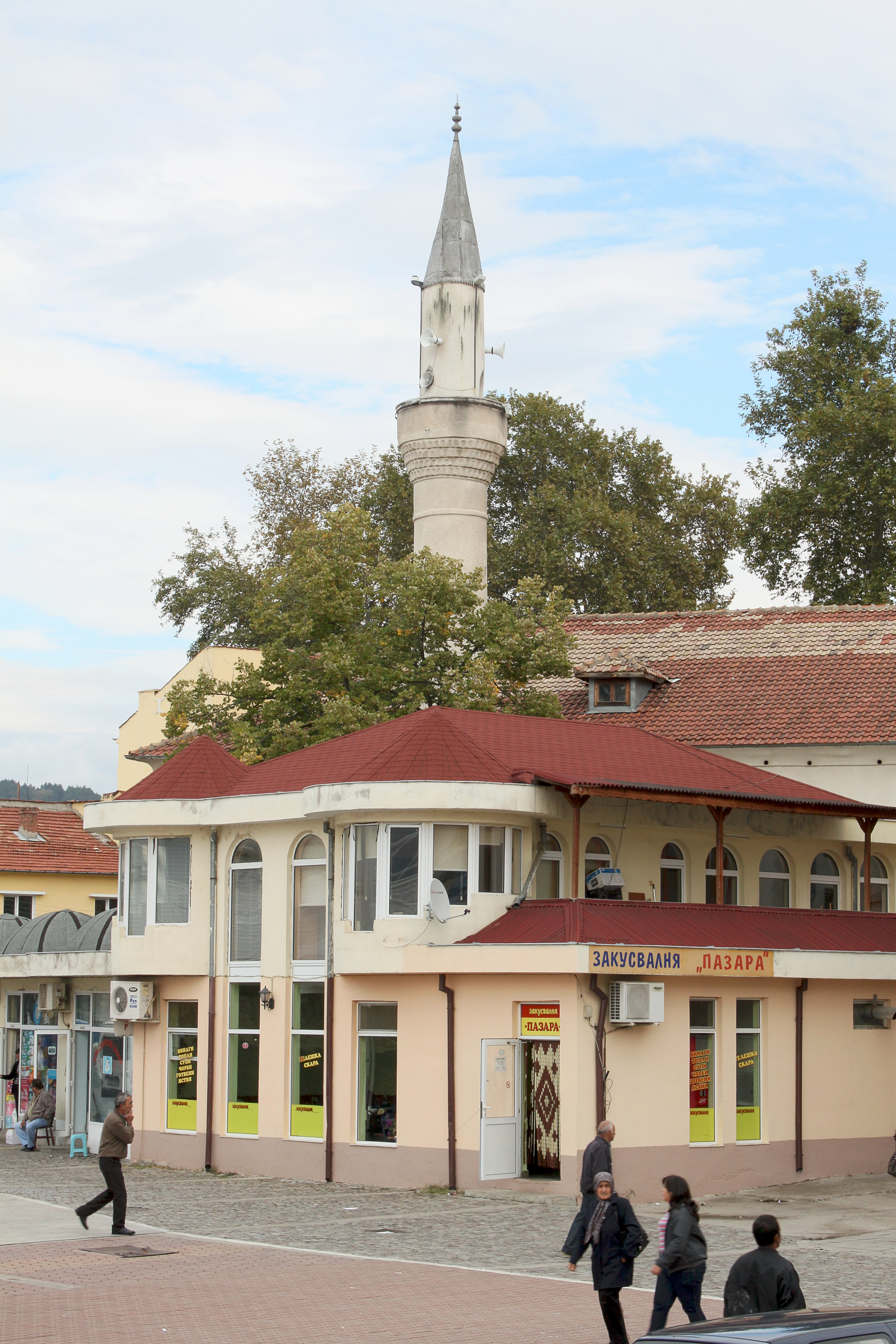 Kardschali; Bulgarien